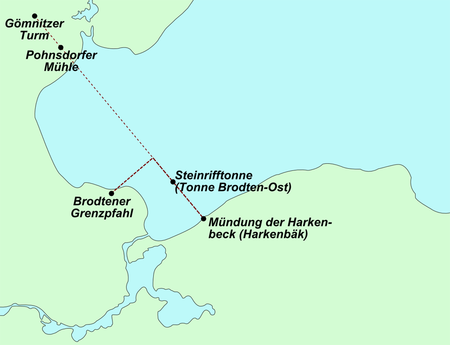 Karte der Lübecker Bucht; Lübecker-Bucht-Fall; Fischereihoheit und Schiffahrtshoheit